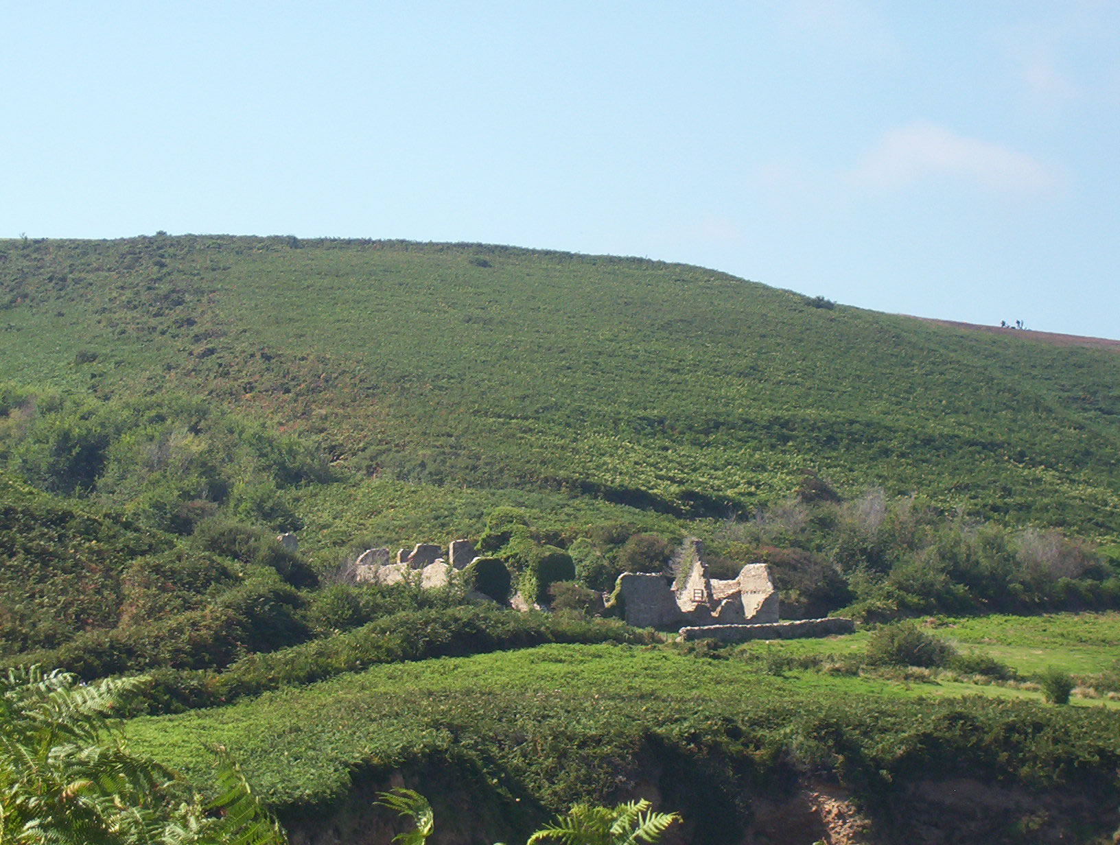 Ruines de la ferme de la Cotentine, à Omonville-la-Rogue. Elle est en partie rebâtie par le Conservatoire du Littoral. Elle a appartenu à Octave de Traynel.